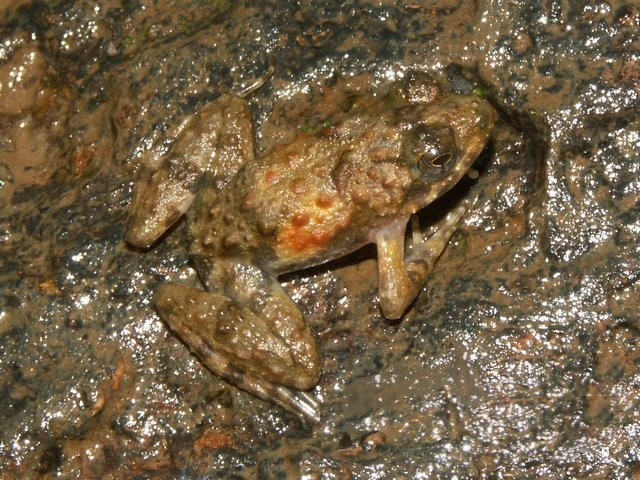 Phrynobatrachus calcaratus